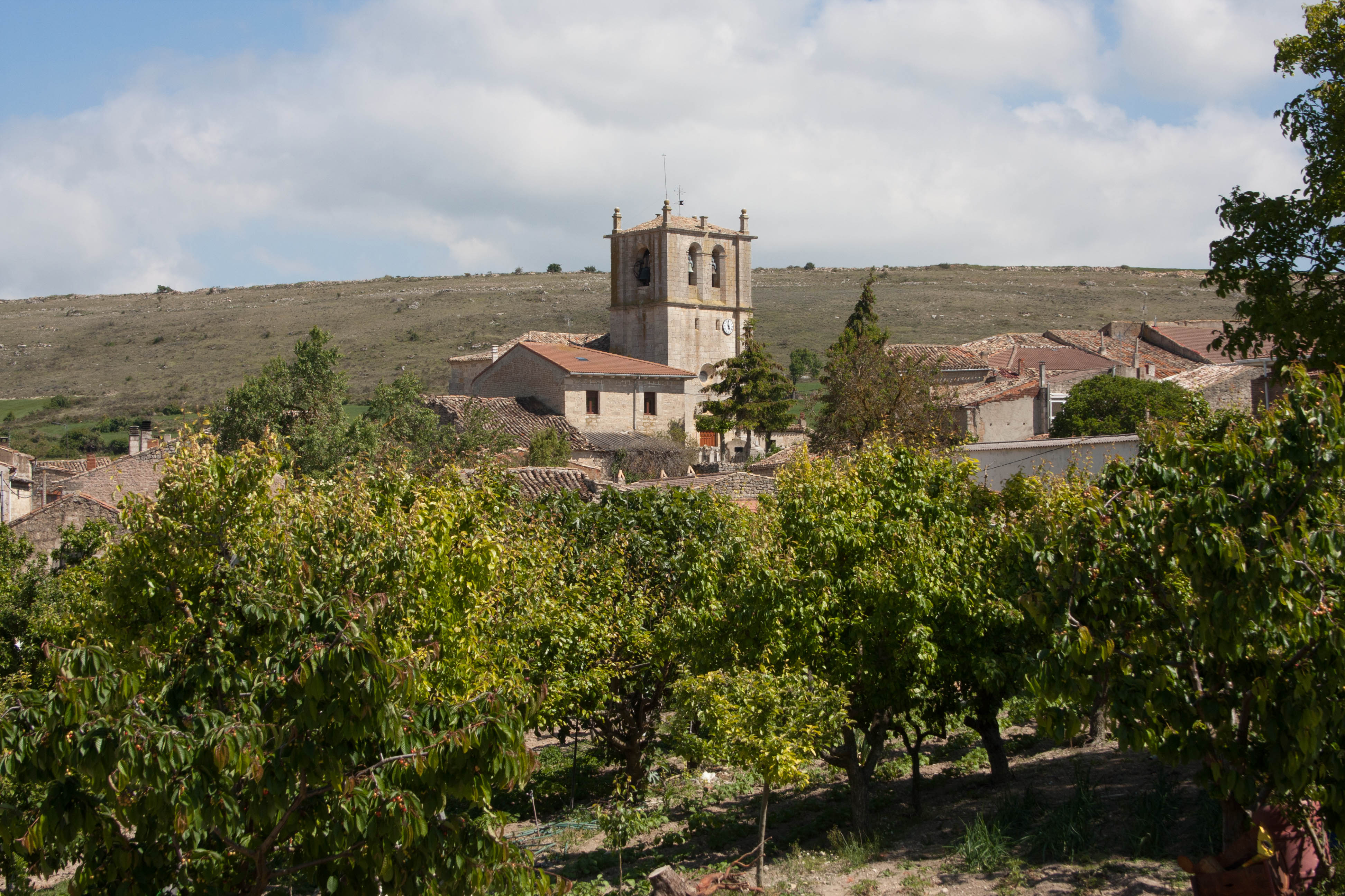 Villandiego localidad de Burgos.